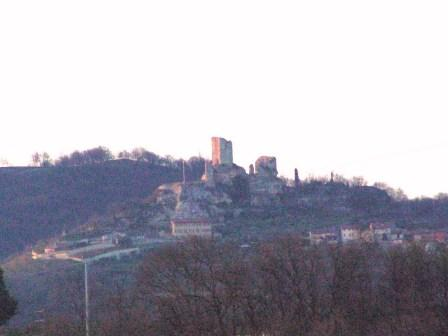 Foto della Rocca dei Vescovi a Brendola (Vicenza)